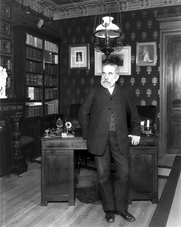 Frans Hedberg (1828-1908)